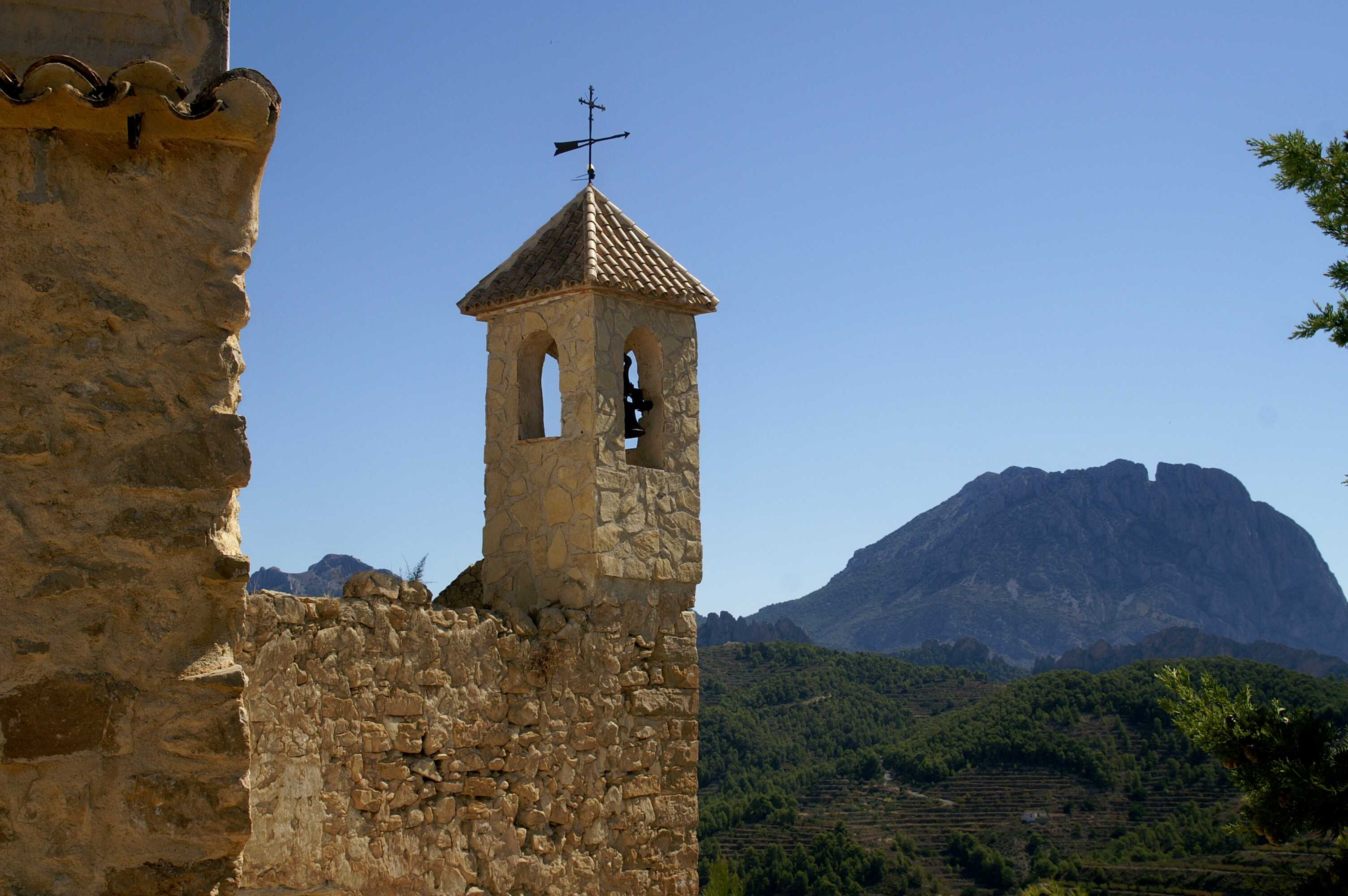 Vistas del Puig Campana desde la ermita.